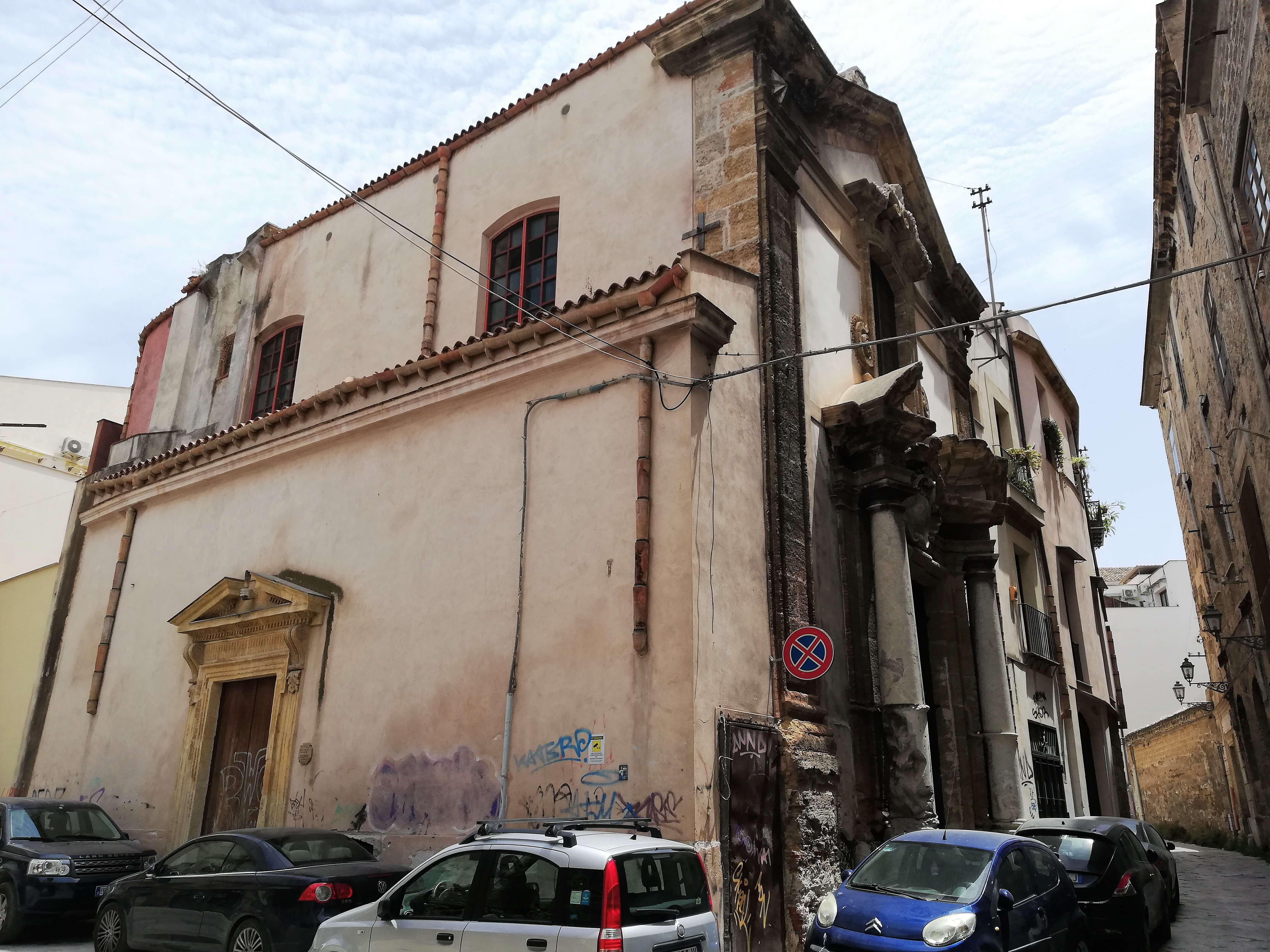 Veduta totale dell'edificio.